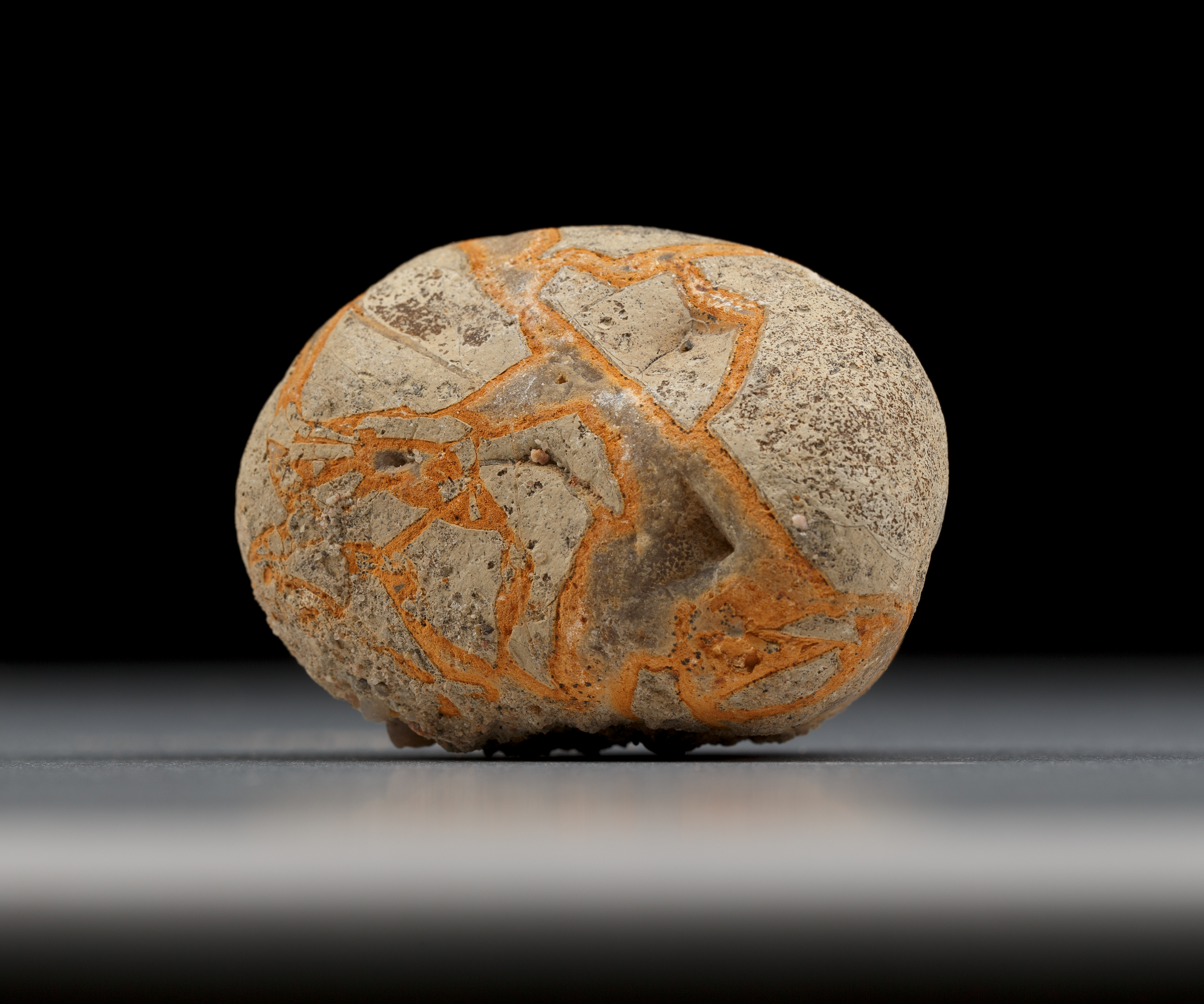 Septarien-Knolle; Kalkstein Herkunft: Dänemark bis Norddeutschland Alter: Tertiär Fundort: Kiesgrube Gusow